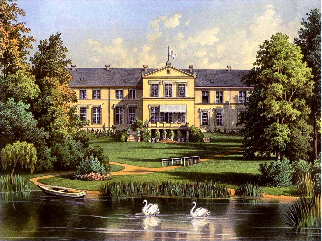 Gut Gross-Jannewitz, Lithographie von Alexander Duncker, 1869